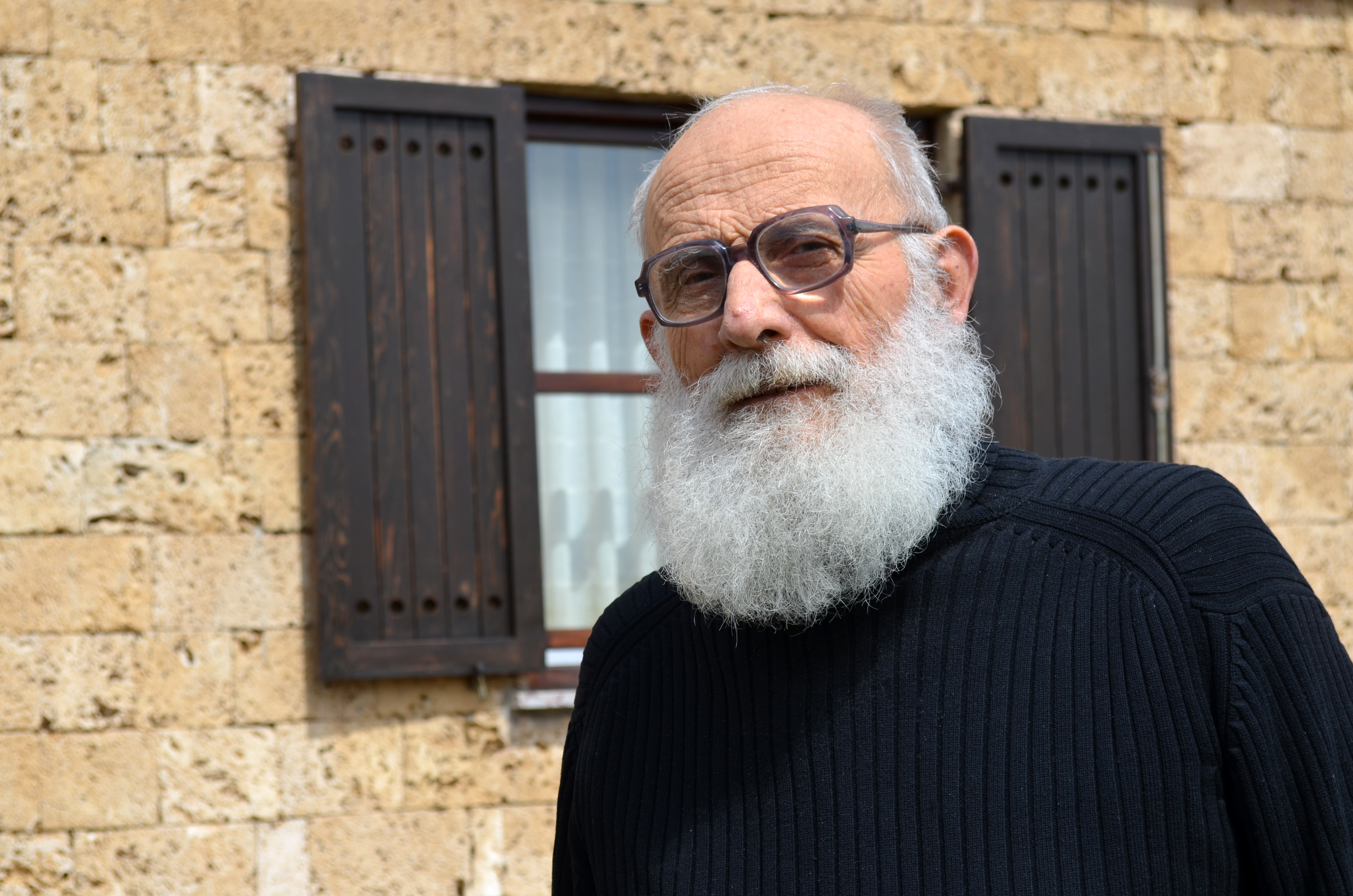 Dragoljub Petrović je srpski lingvista, srbista i univerzitetski profesor.